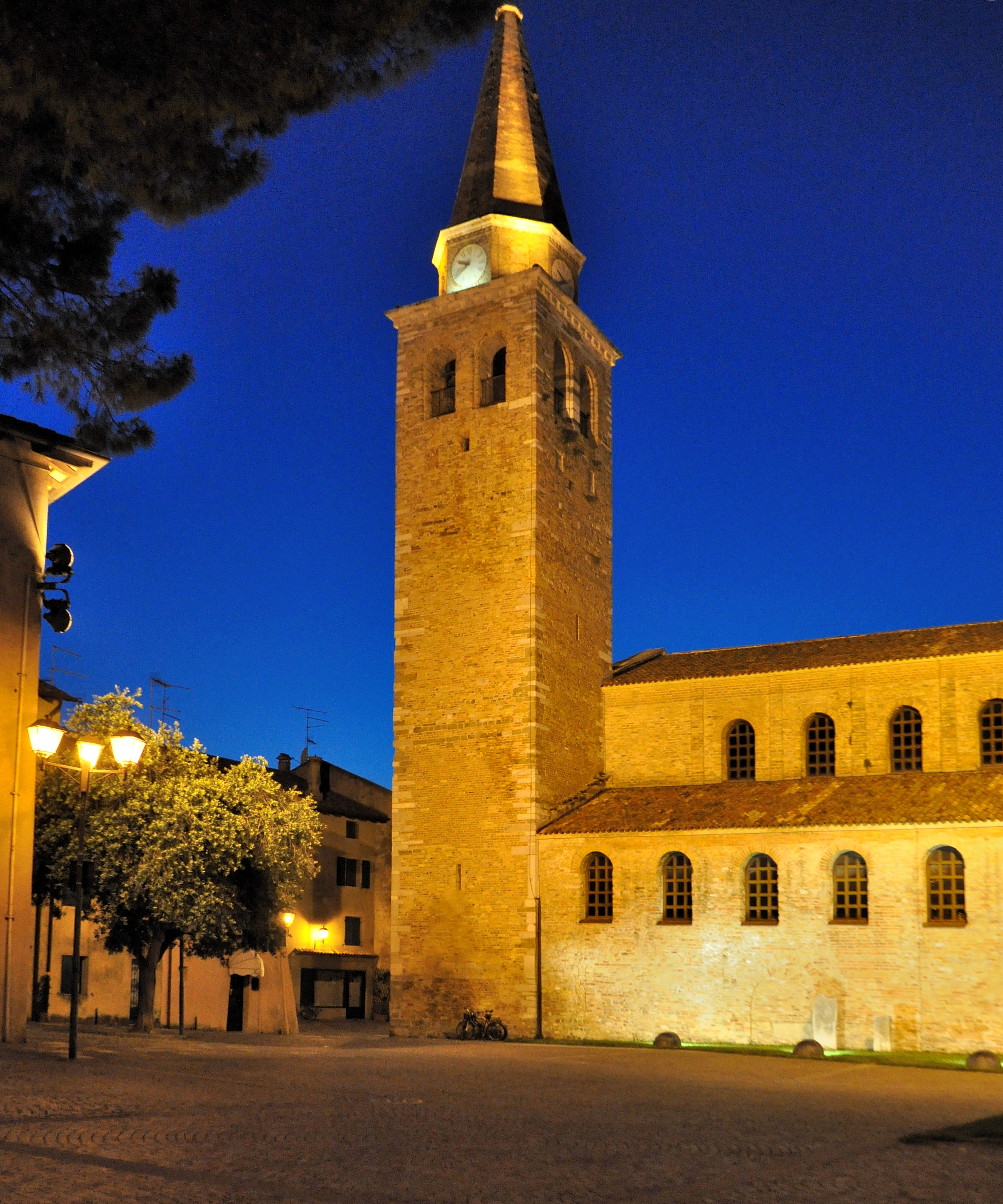 Die Kirche Sant'Eufemia in Grado zur Blauen Stunde